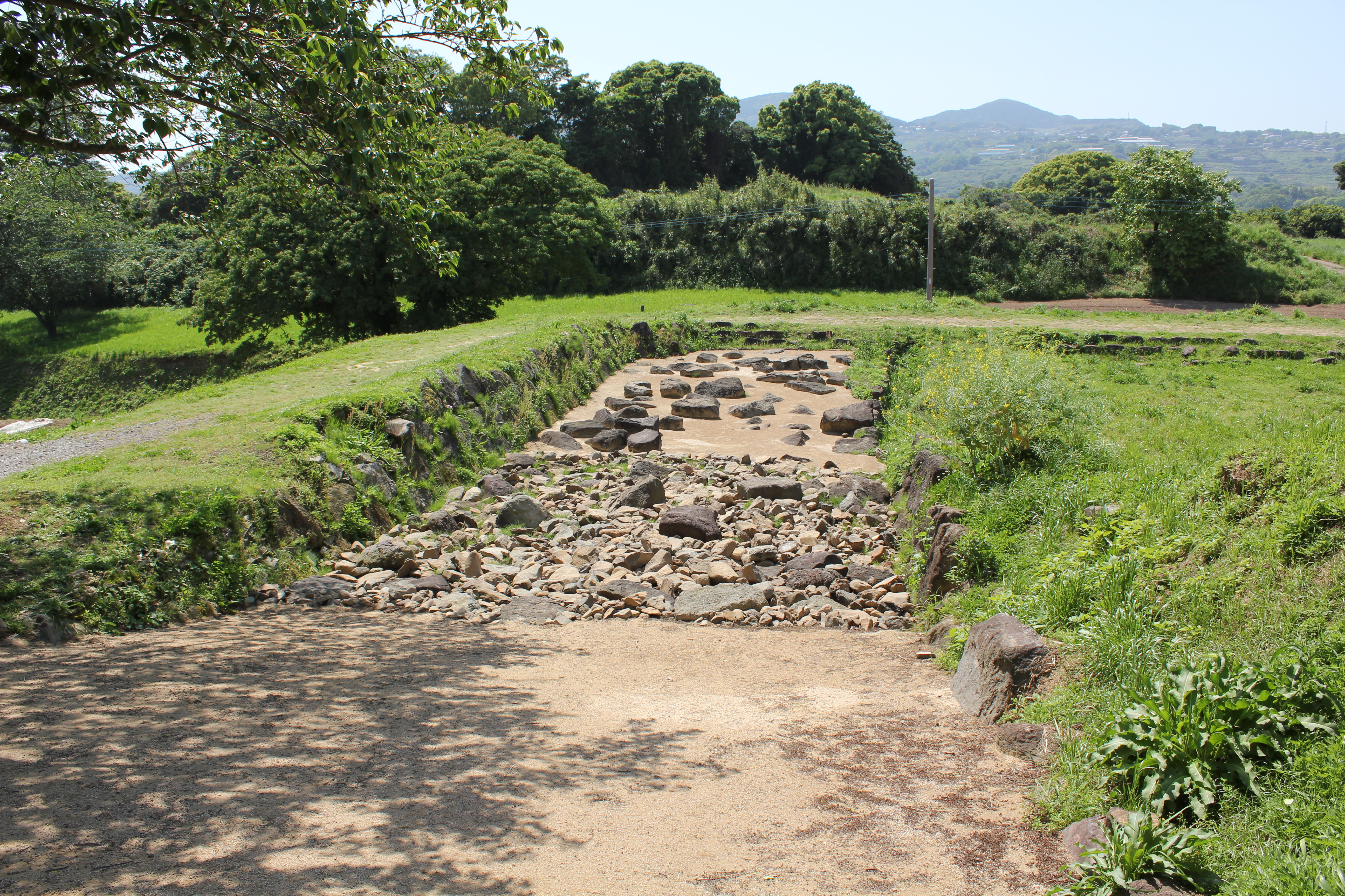 原城虎口遺構（長崎県南島原市） Canon EOS Kiss X4